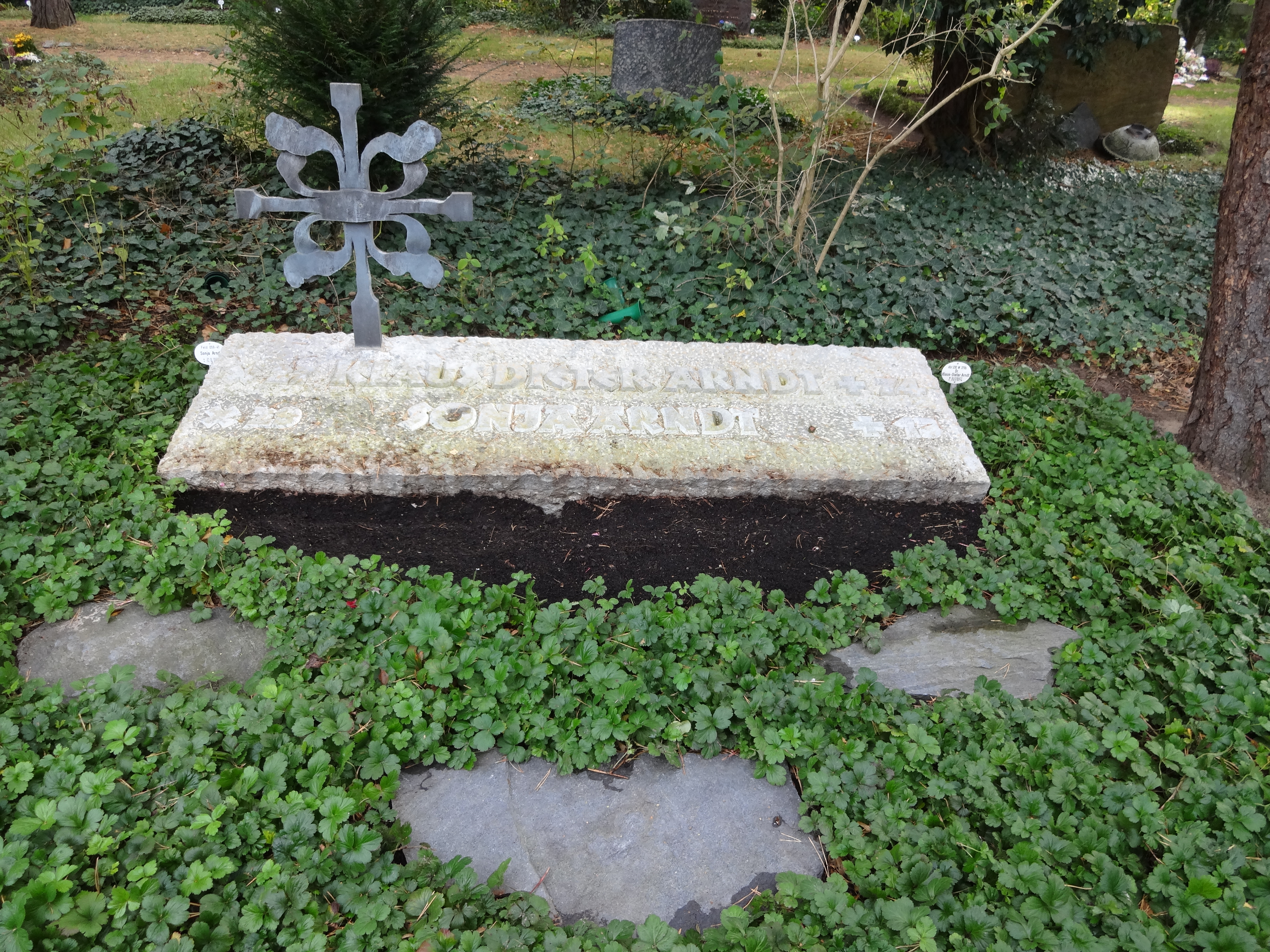 Grab von Klaus Dieter Arndt auf dem Waldfriedhof Zehlendorf